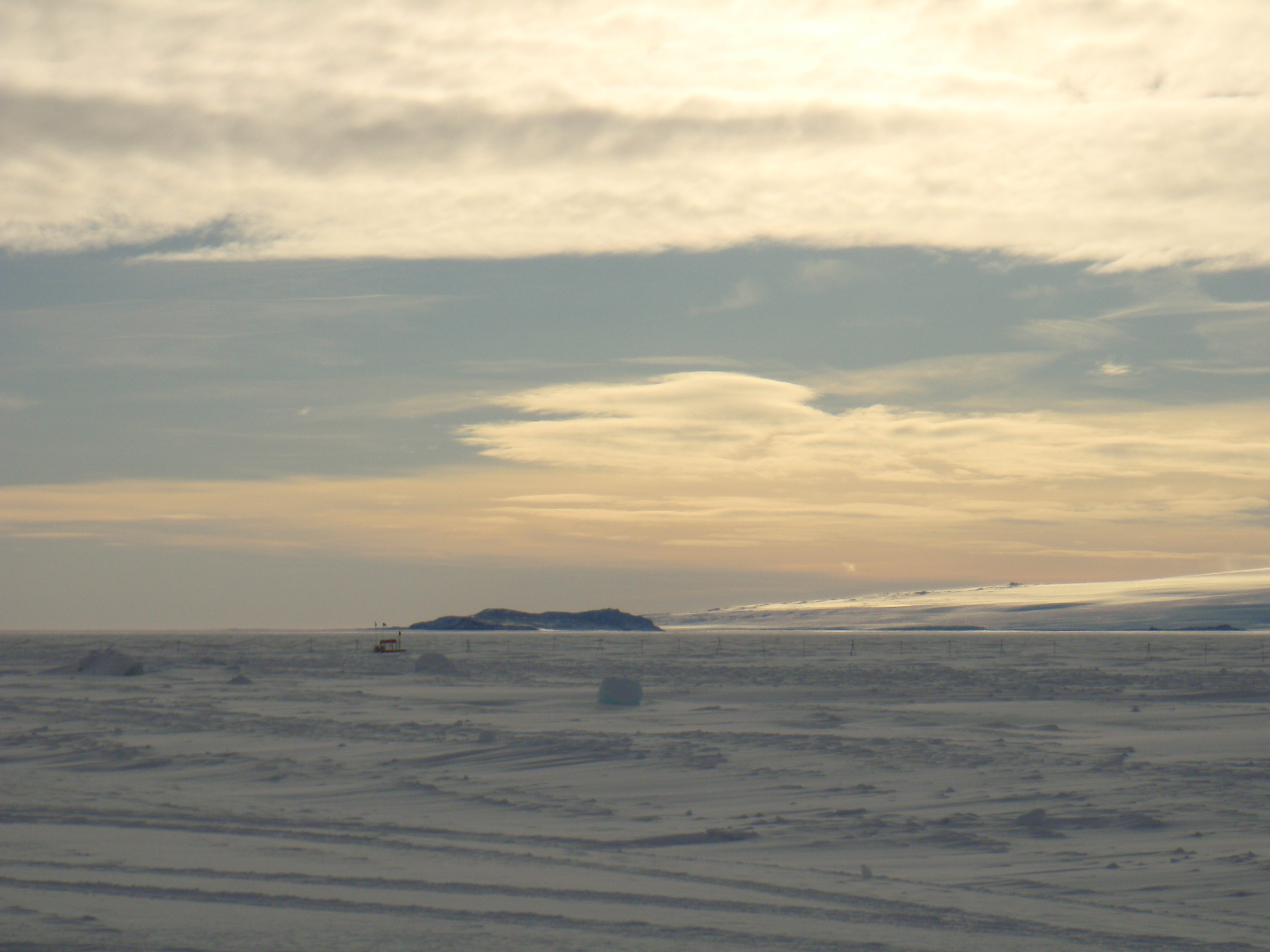 Big Razorback Island under Clouds